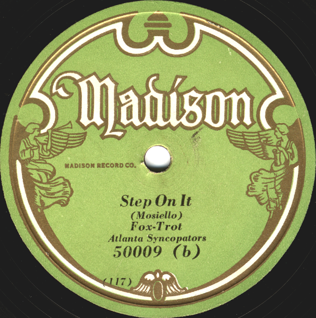 Madison label from circa 1929.